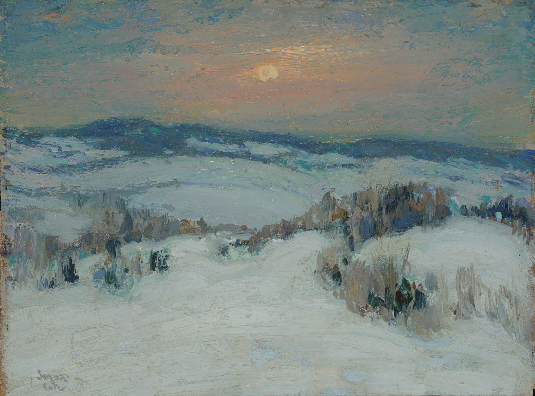 Paysage d’hiver (Collines d’Arthabaska), (s.d.), Huile sur toile, 22,9 x 30,5 cm. Collection Pierre Lassonde.